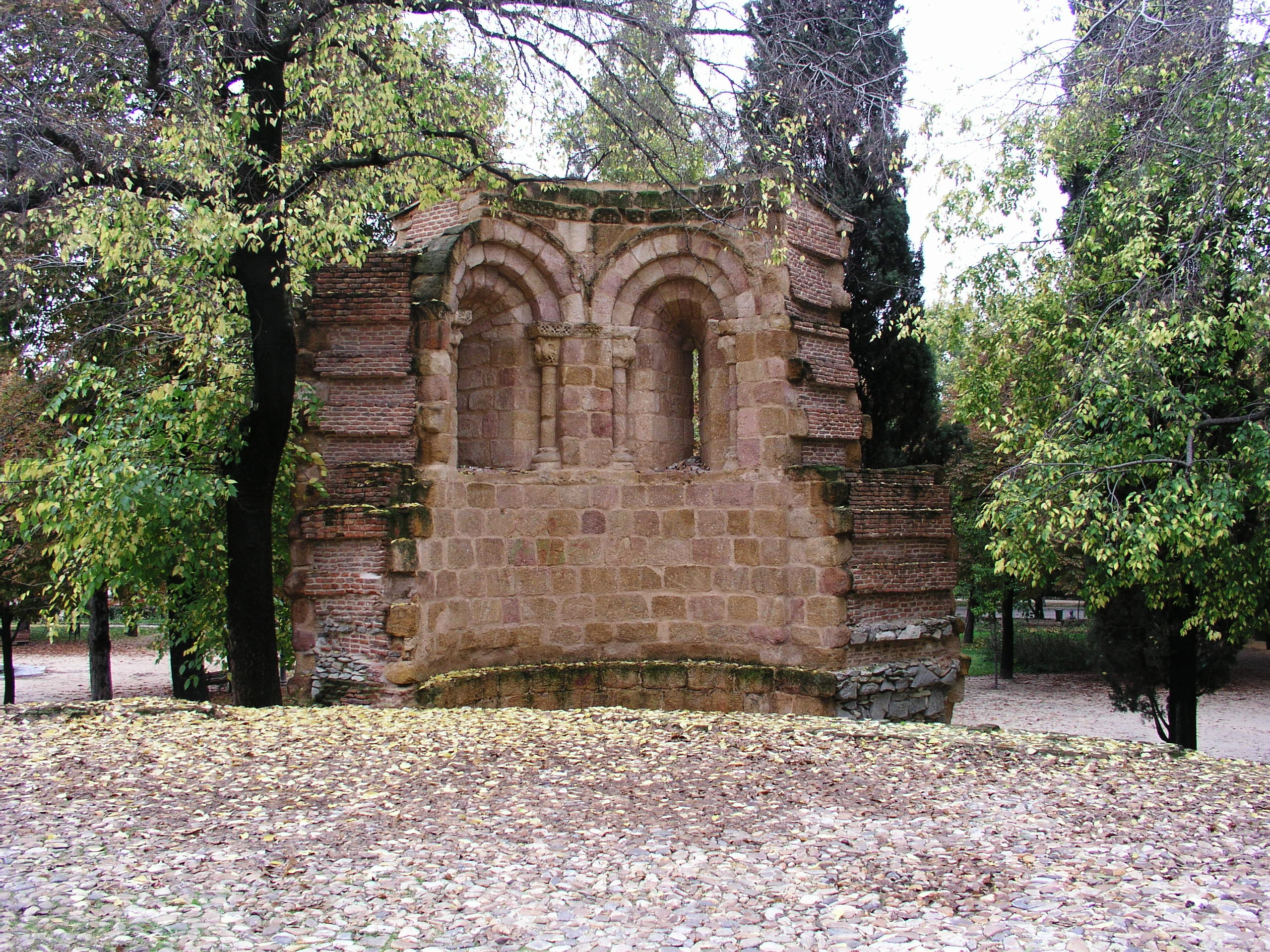 Jardines del Buen Retiro, Madrid, Spain. Ruinas de la Ermita de San Pelayo y San Isidoro.